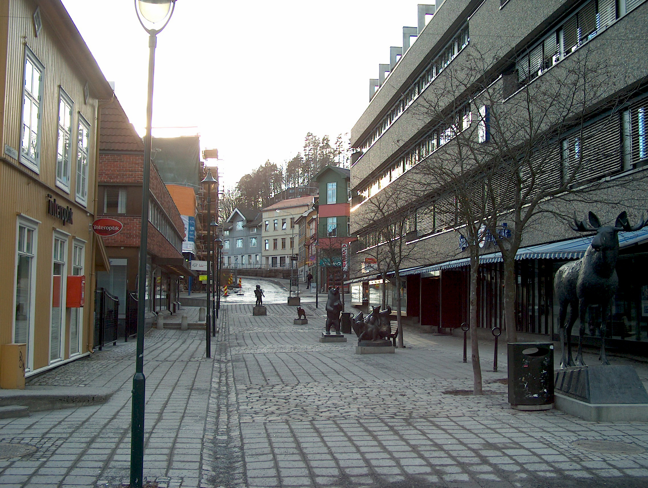 St. Olavs Gate i Hønefoss (Norway)